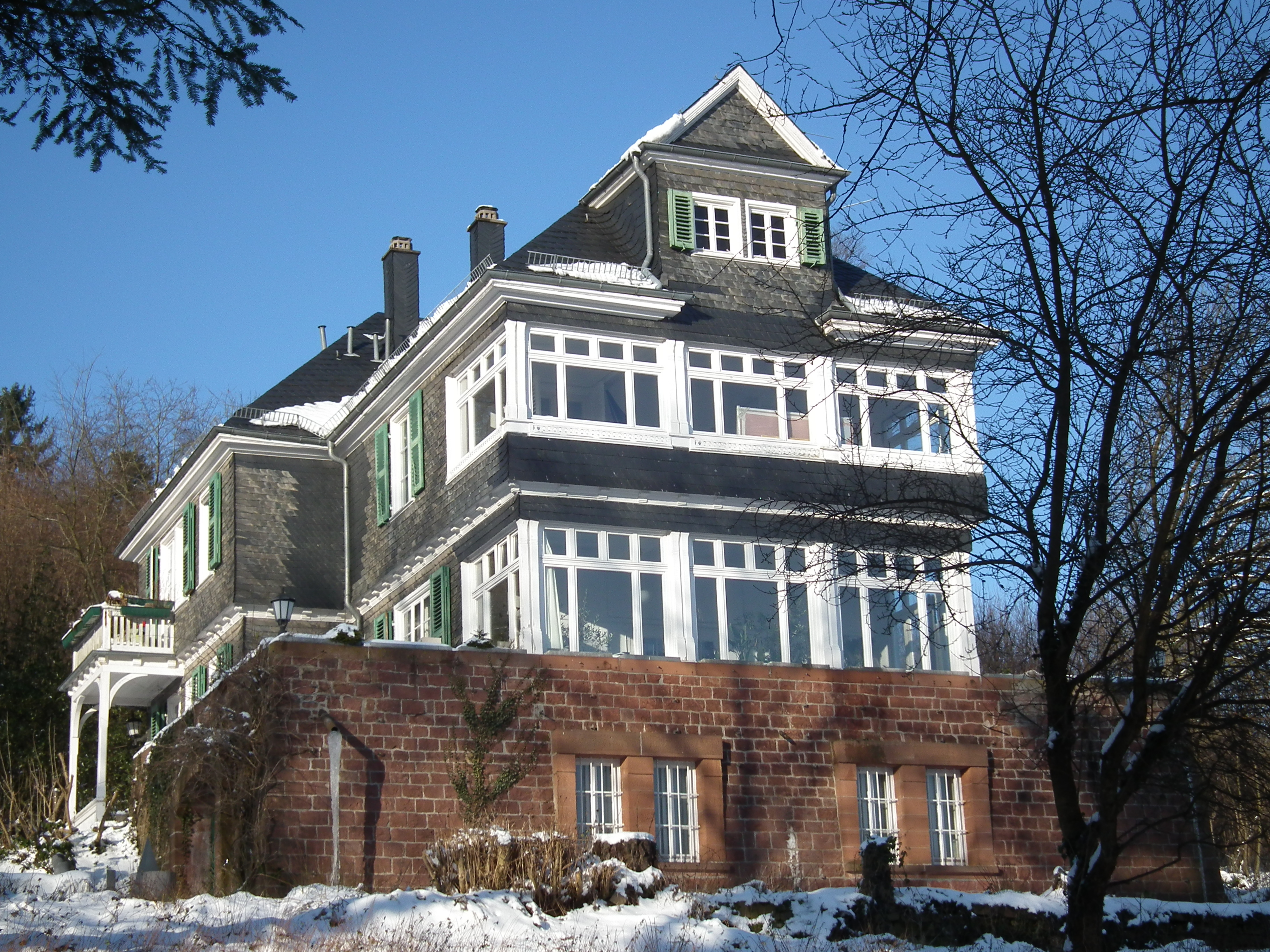 Schiefergedecktes Haus auf dem Kohlhof, früher bekannt als das "Cafe Ehmann" (Baden-Württemberg, Deutschland)